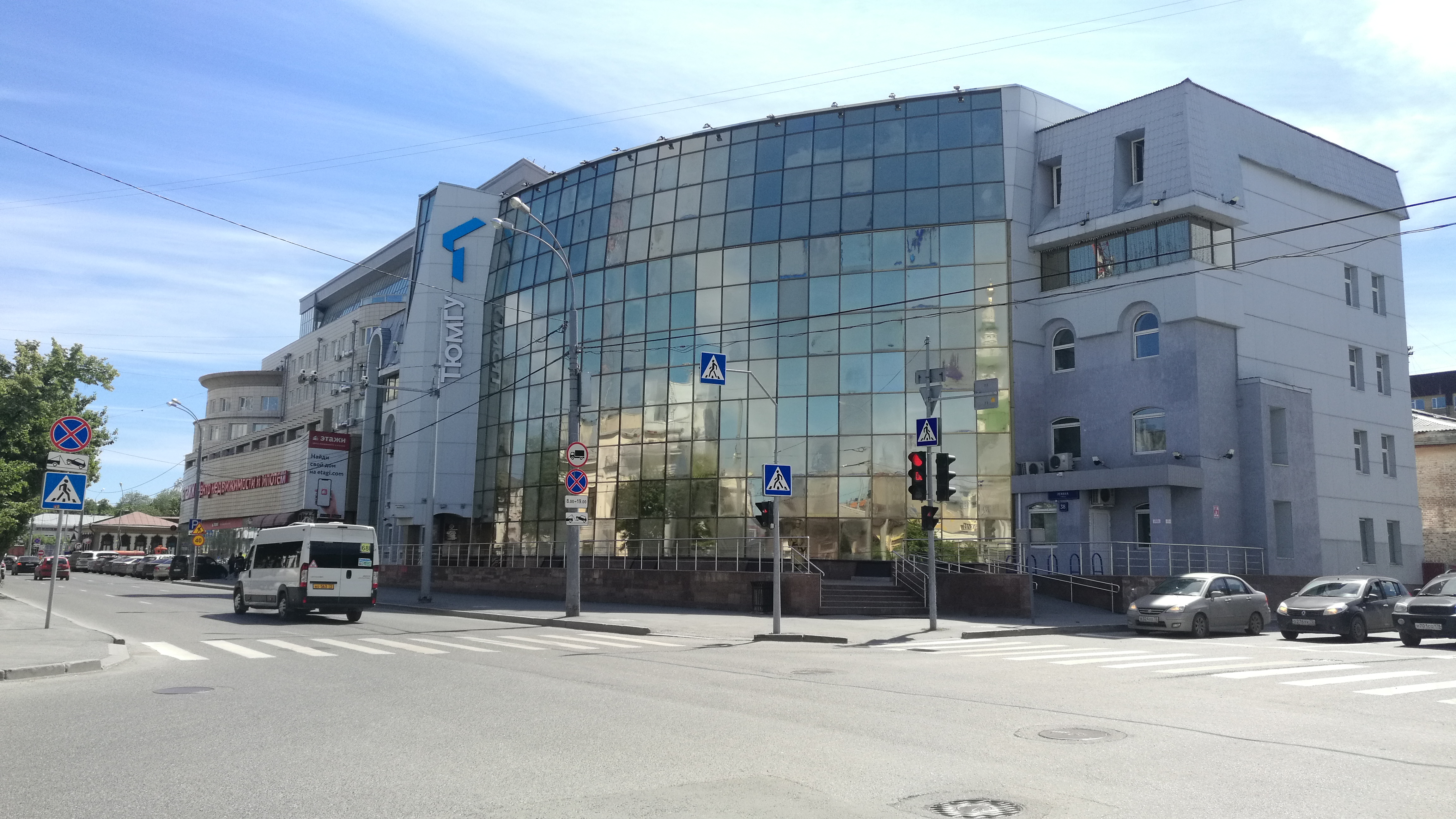 Jura instituto de la Tjumena Ŝtata Universitato. Tjumeno, Rusio.